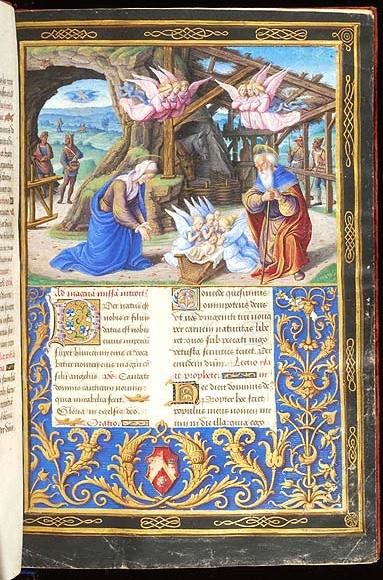 Missel Manuscrit 495 fol 8r